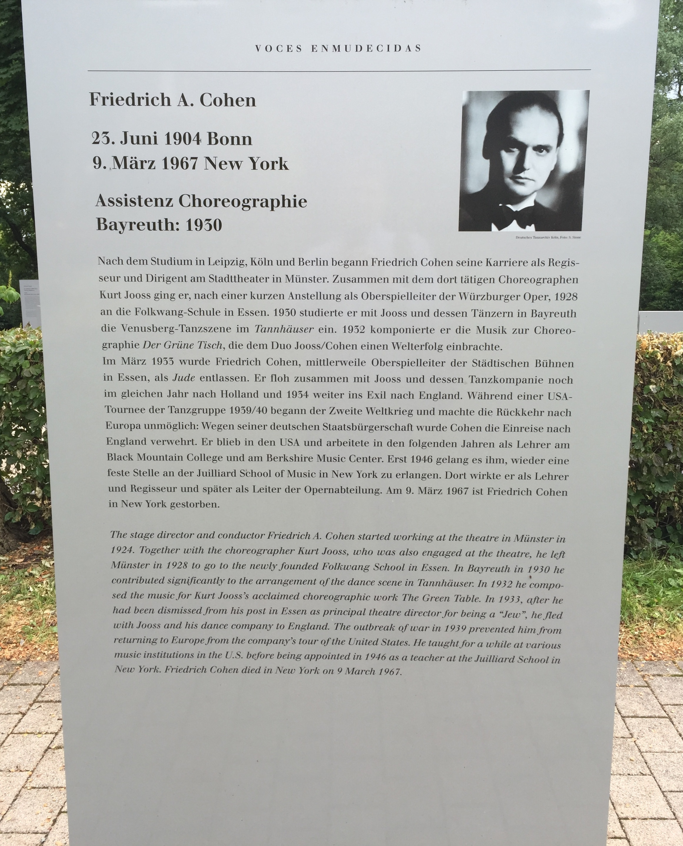 "Verstummte Stimmen - Die Bayreuther Festspiele und die 'Juden' 1876 bis 1945", Ausstellung 2016